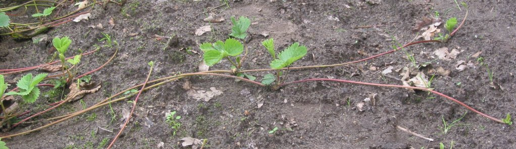 zelfgemaakte foto van uitlopers bij aardbei ras Lambada Categorie:Afbeelding plant